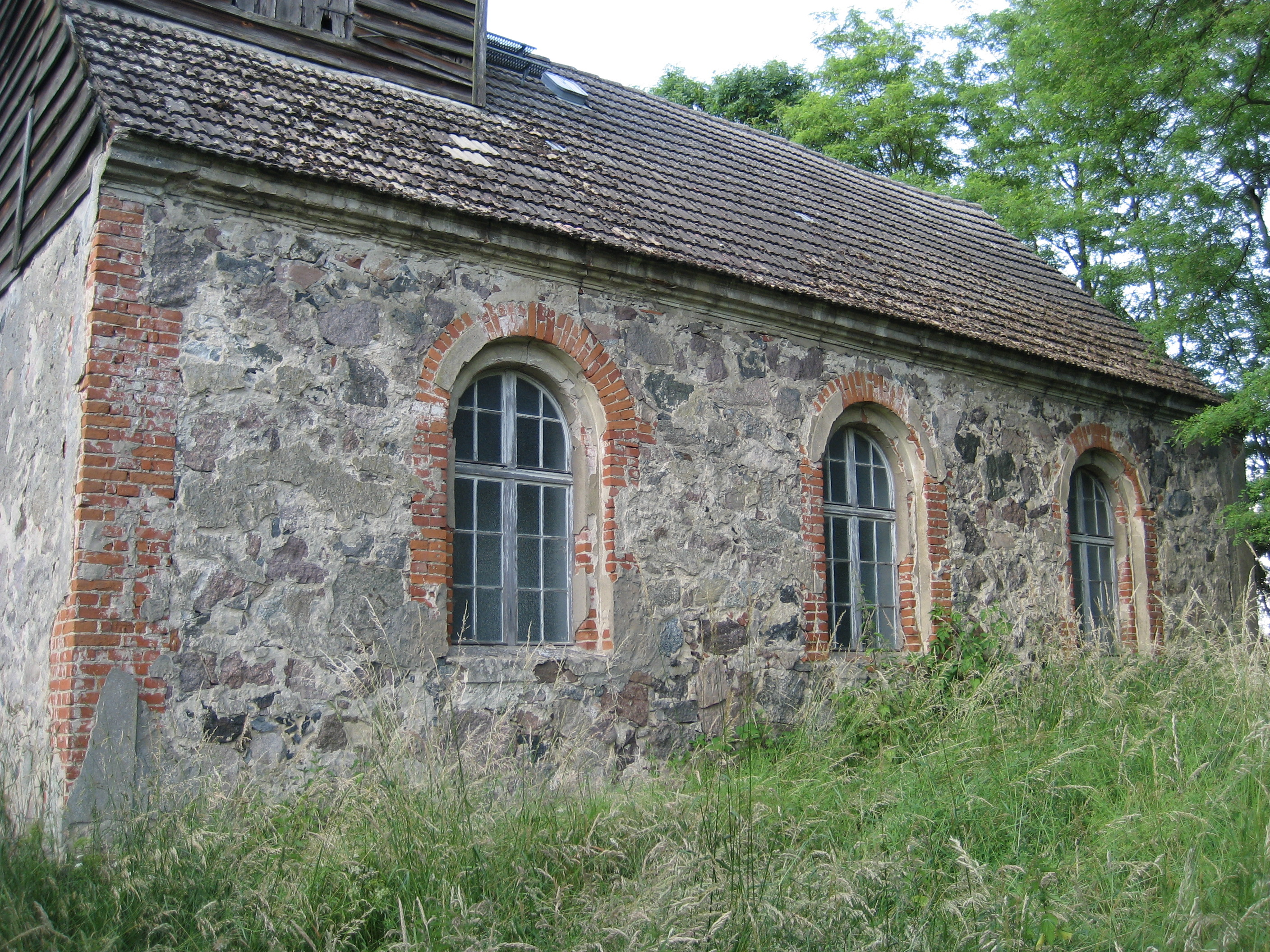 Kirche Polzow aus Blickrichtung Süden.